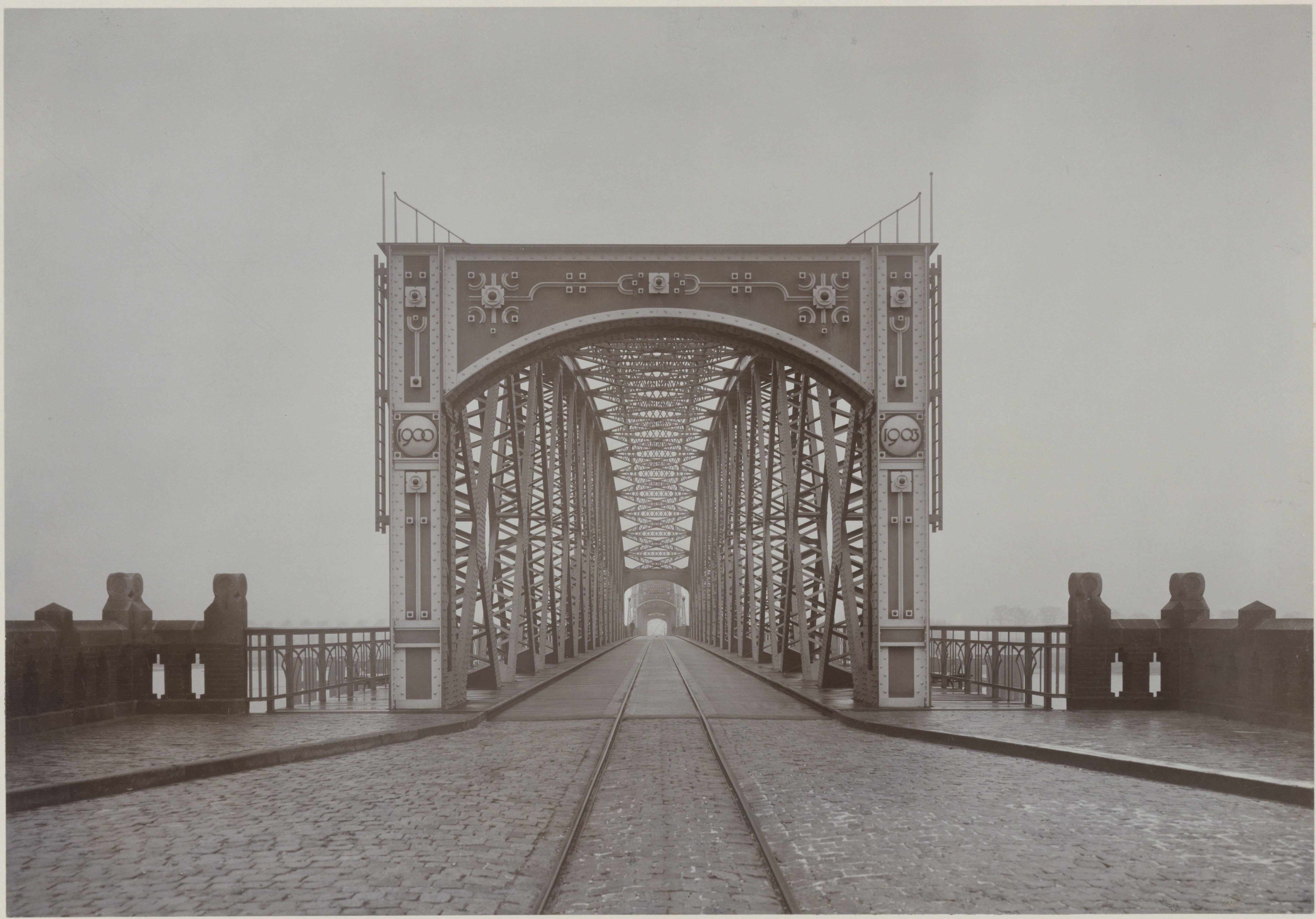 Spijkenisserbrug met trambaan in het midden (1904). Aanzicht van het hoofdportaal en het inwendige van de vaste overspanning bij de linker oever (Spijkenisser kant). Fotocollectie Rijkswaterstaat. Nummer archiefinventaris: toegang 2.24.11. Inventarisnummer: 51. Bestanddeelnummer: 402.